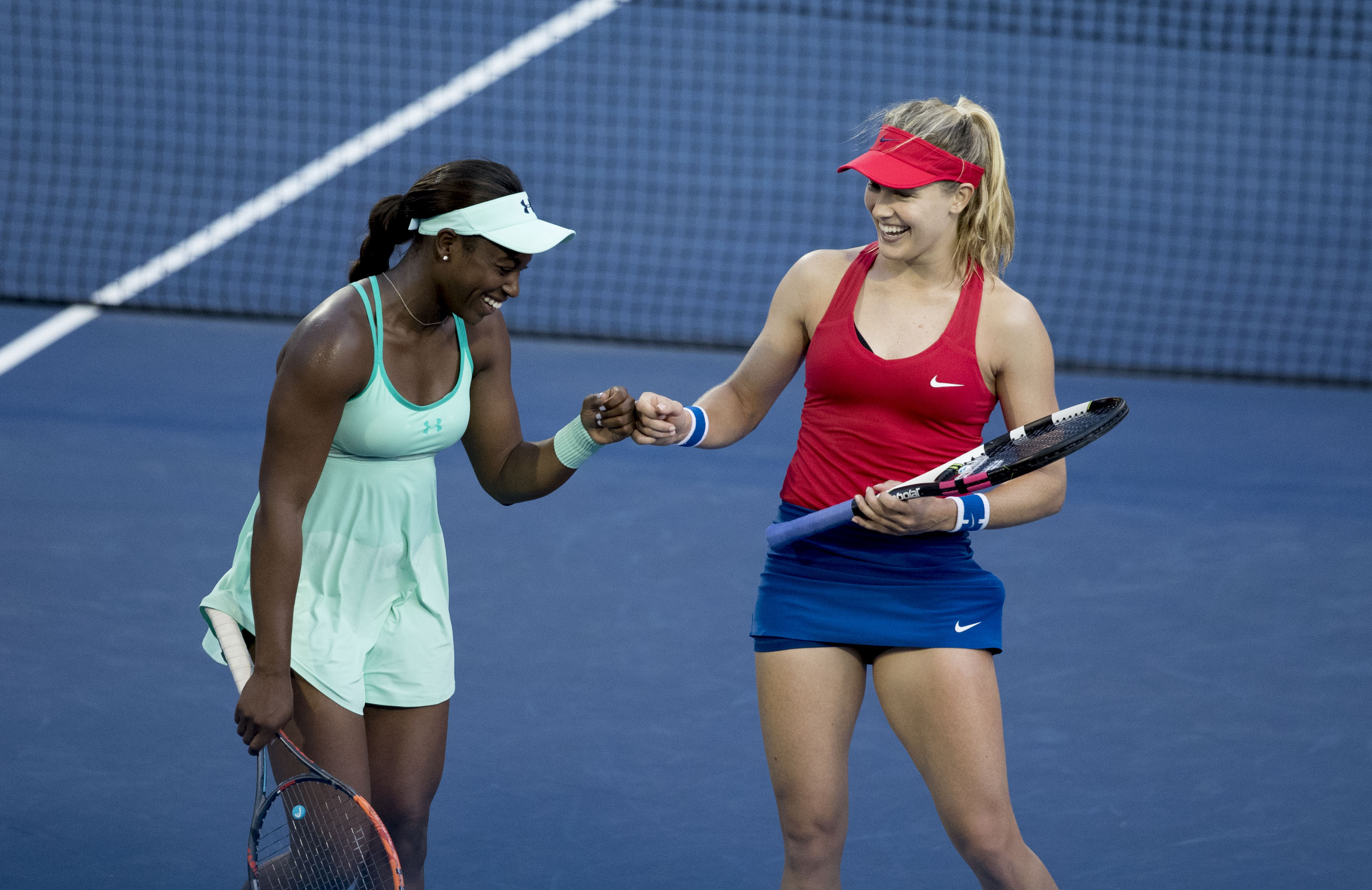 Citi Open Tennis 2017